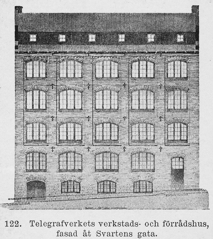 Fiskaren mindre 14, Telegrafverkets verkstad och förråd (äldre delen)